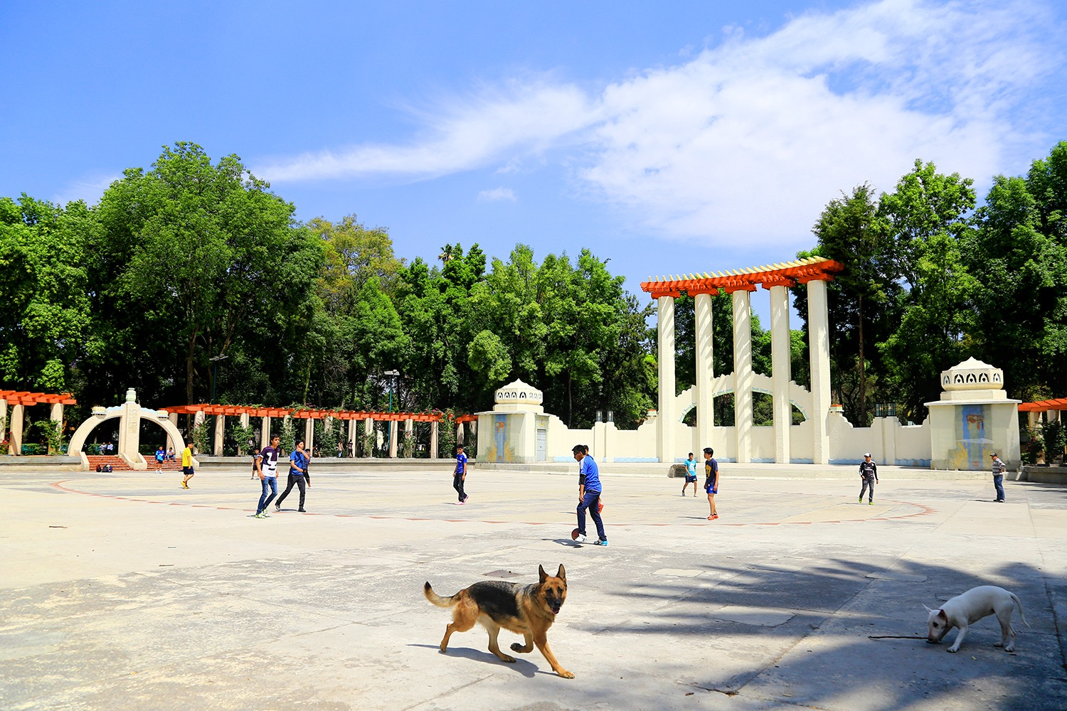 Foto del Foro Lindbergh del Parque Mexico, Ciudad de México